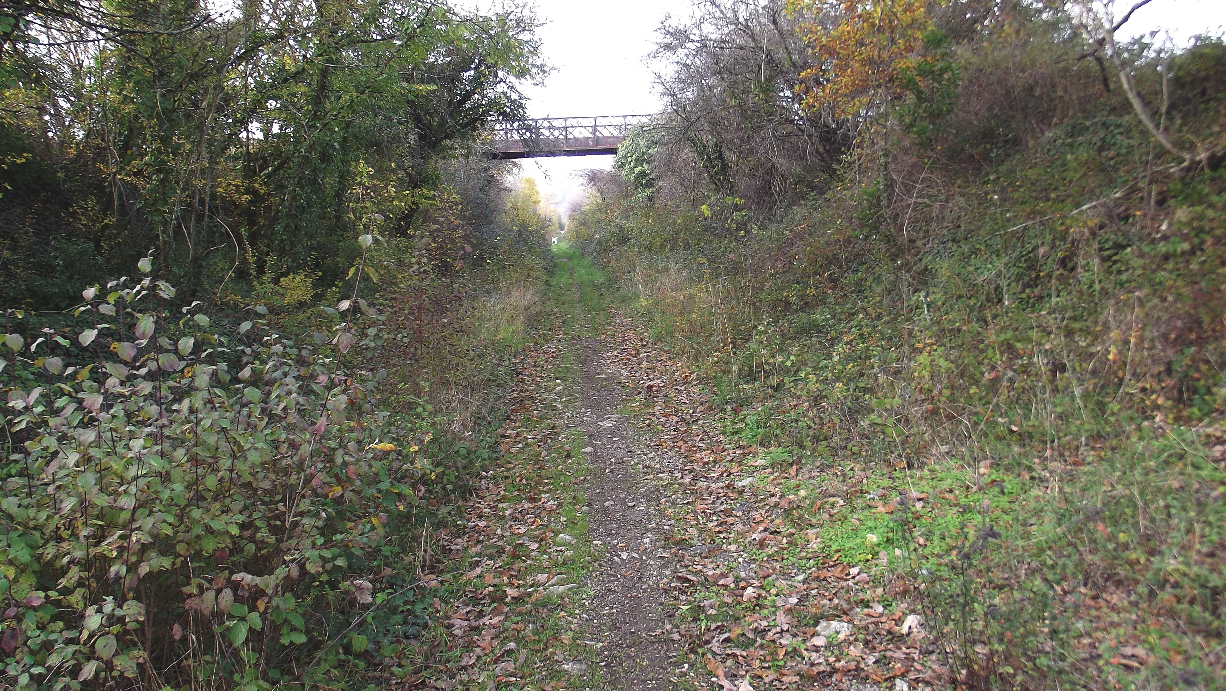 Duravel (Lot, France) - Chemin de randonnée empruntant l' ancien chemin de fer